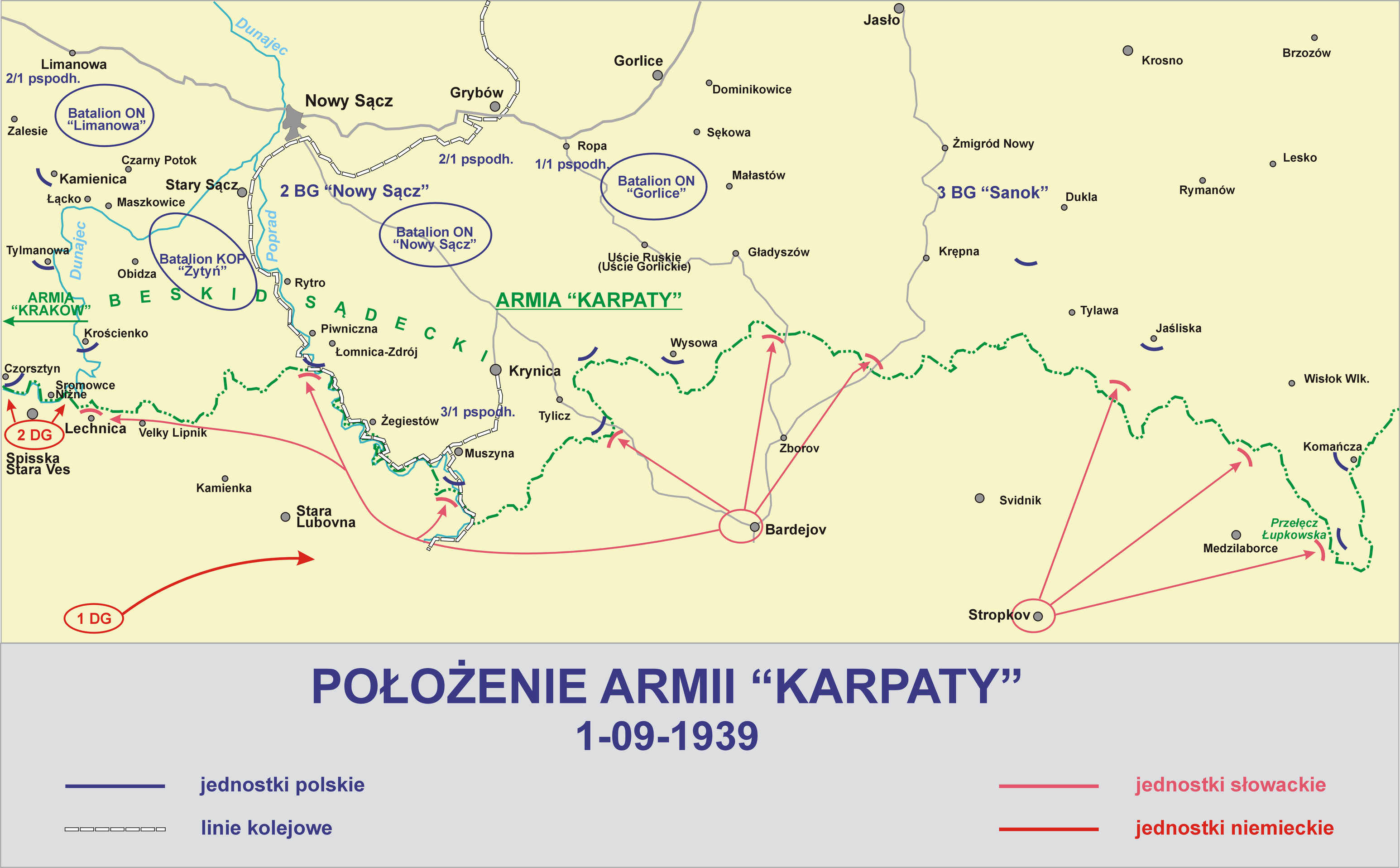 Położenie Armii "Karpaty" 01-09-1939 (rano)